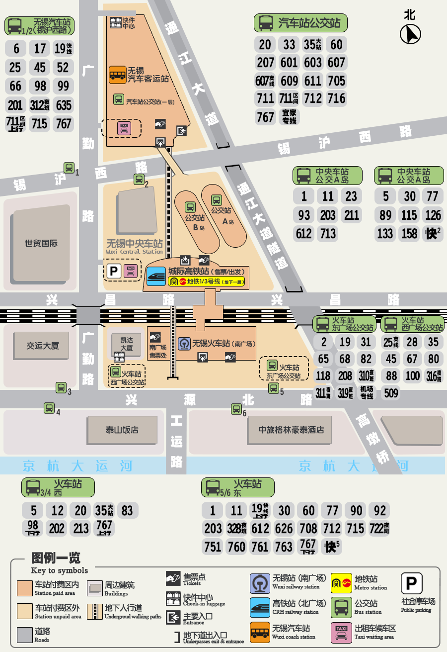 无锡中央车站地区（含无锡站南广场）示意图